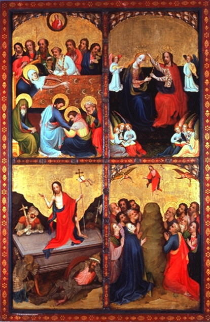 Scènes de la vie de Marie et du Christ WRM 737